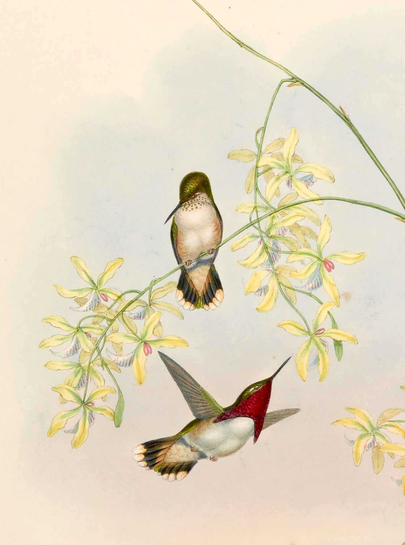 Coppia di Colibrì bombo (Atthis heloisa), la femmina è in alto e il maschio in basso.